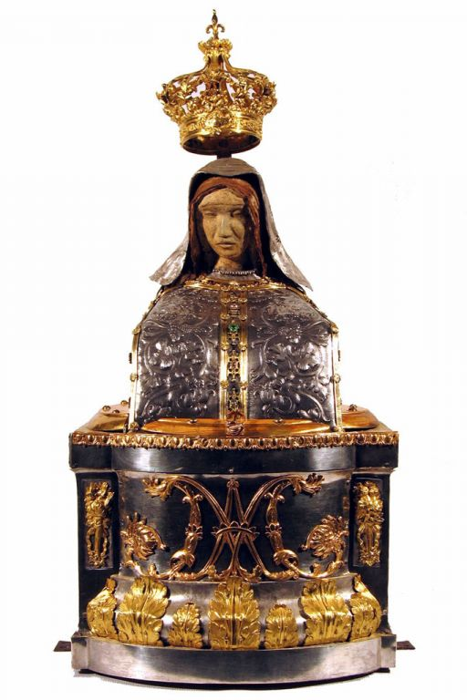 Immagine della Madonna di Provenzano, busto in terracotta del XV secolo, rivestito in lamina d'argento.